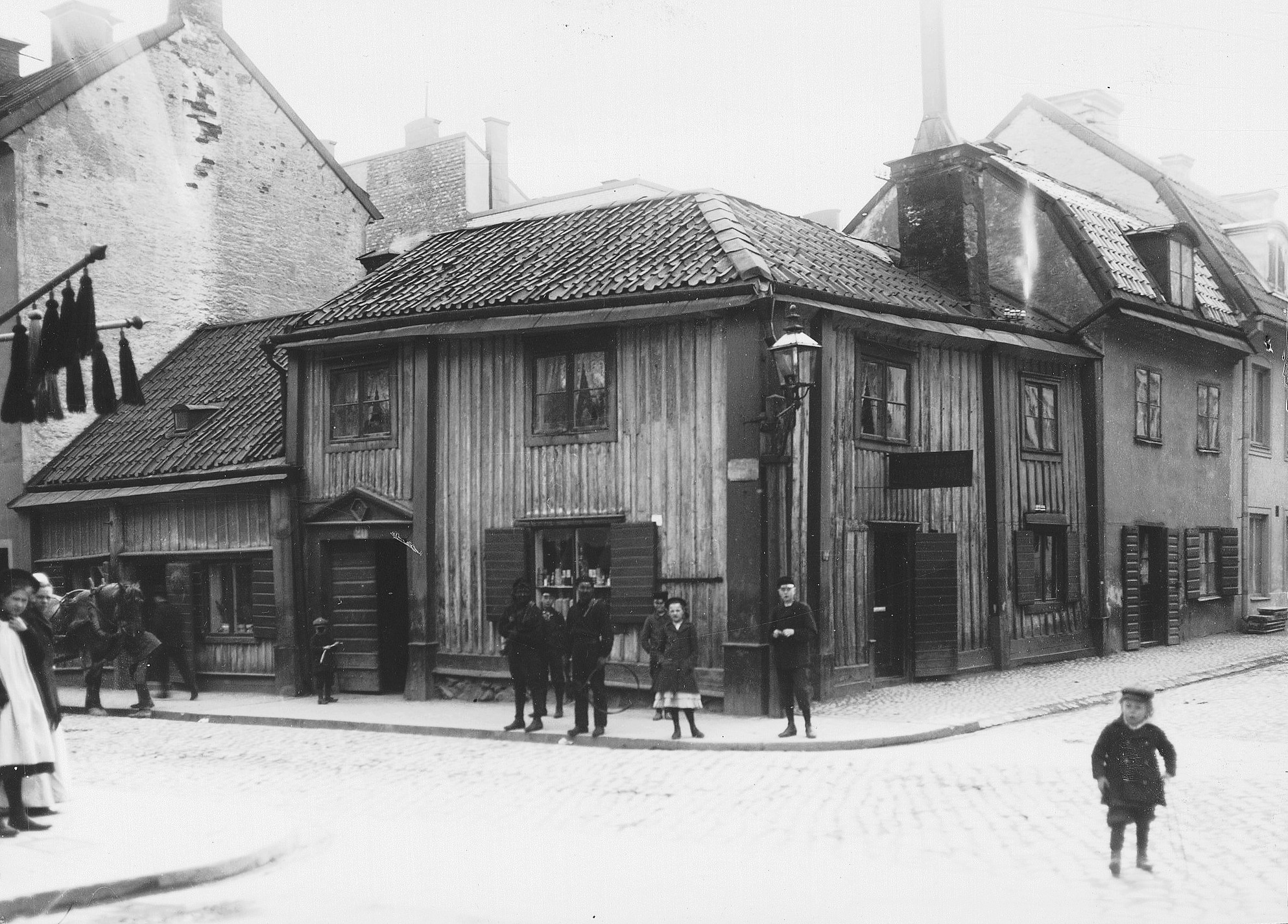 Fastigheten Bonden större 44, hörnet Södermannagatan / Bondgatan